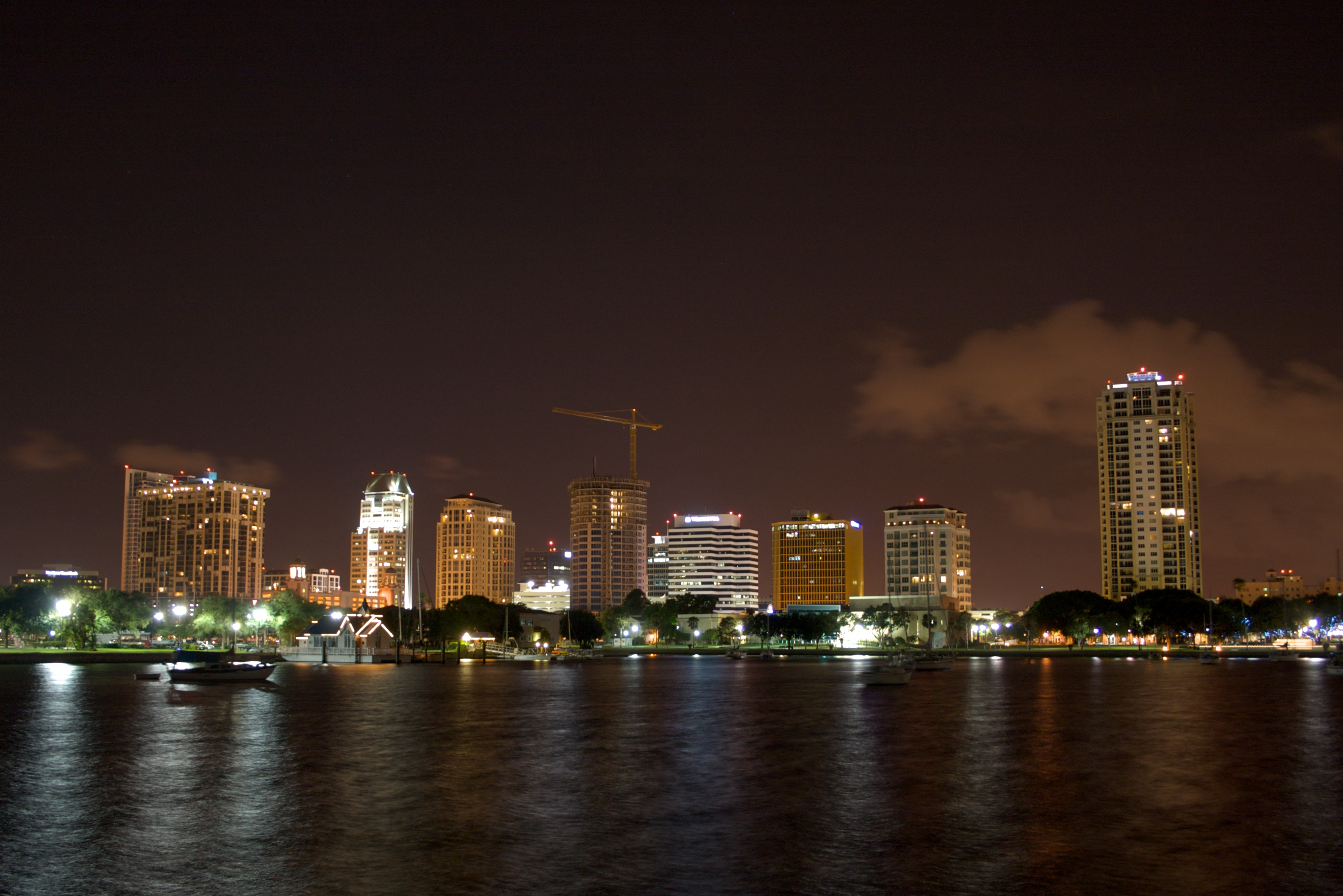 St. Petersburg, Florida